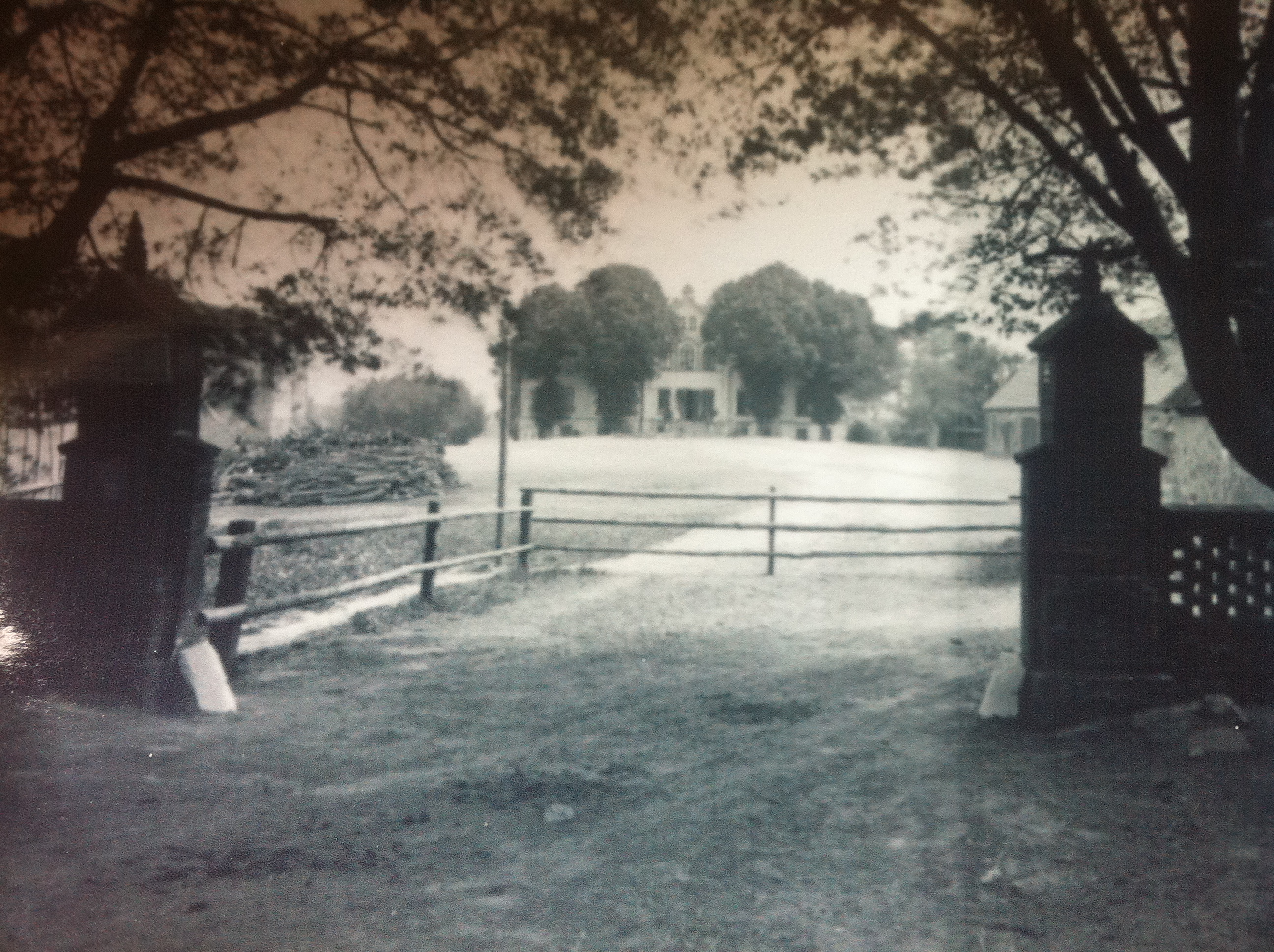 Rittergut Steinbeck bei Bellin (um 1910)